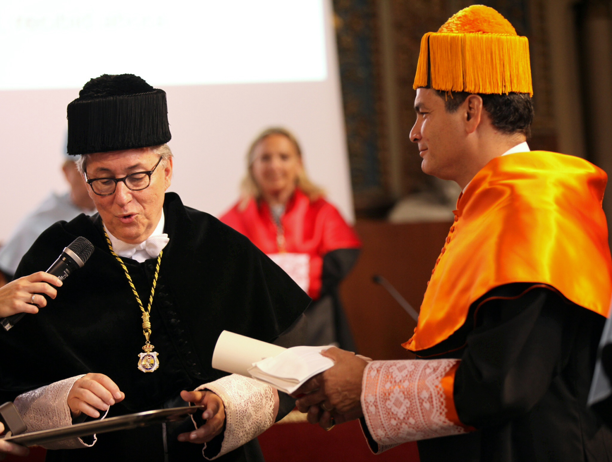 Barcelona (España), 23 de Abril de 2014. La Universidad de Barcelona otorgó el doctorado Honoris Causa al Presidente Rafael Correa, en reconocimiento a sus méritos académicos. Foto: Karen Ramos. Cancillería del Ecuador.